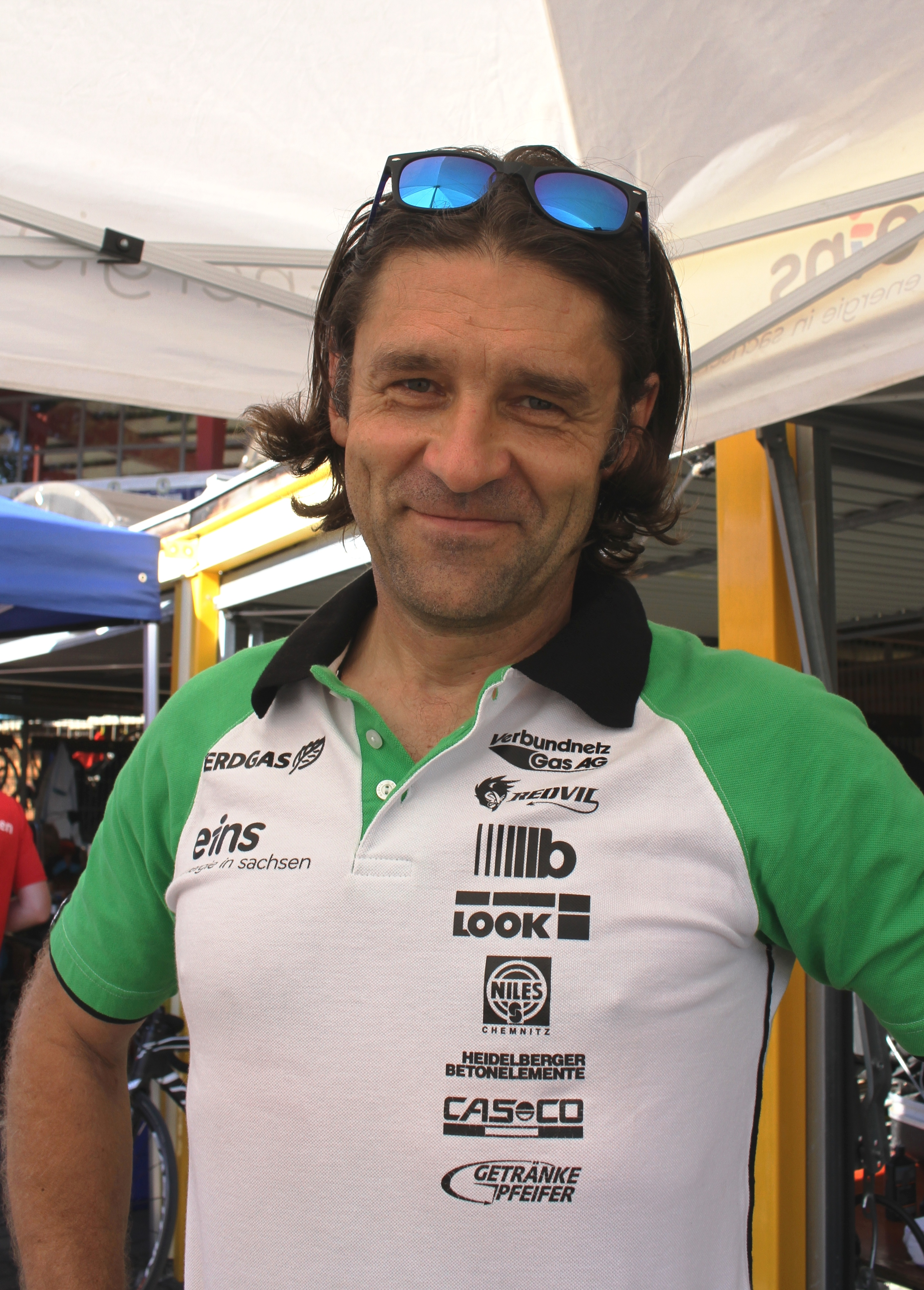 Thomas Will, ehem. deutscher Radsporltler und Teambetreuer